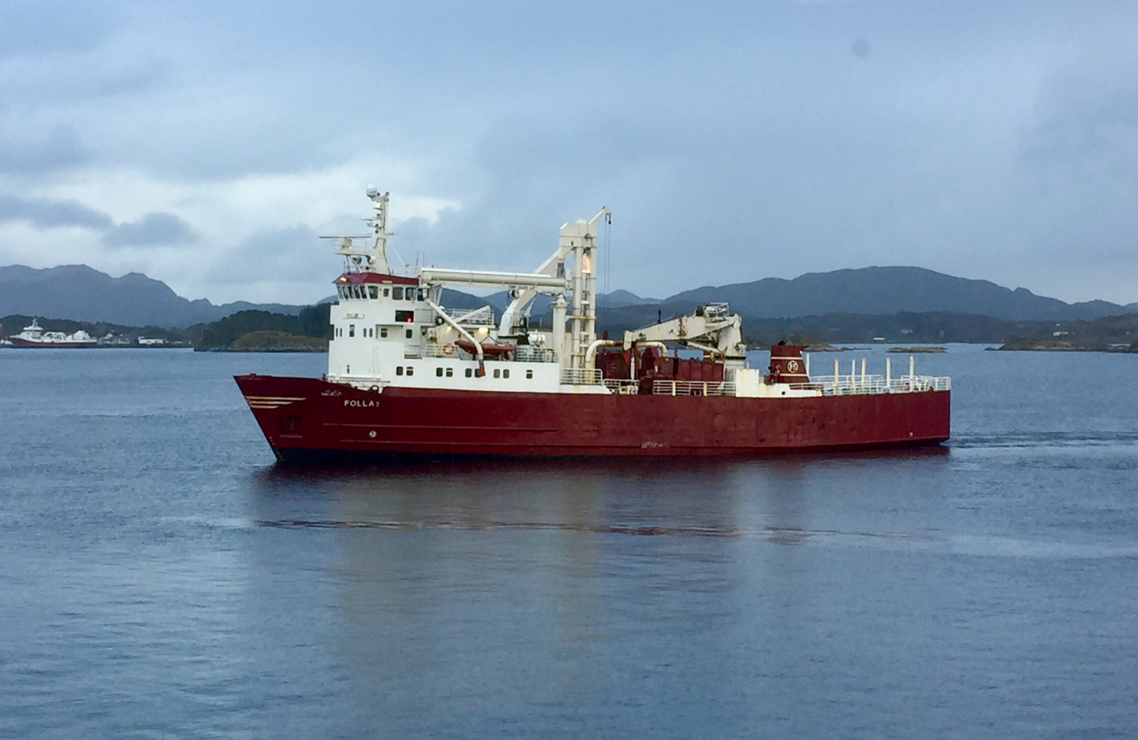 MS «Folla» (tidligere «Hardangerfjord»), i fast fraktfart for Folla Sjøtransport (NTS), her i Nærøysundet.